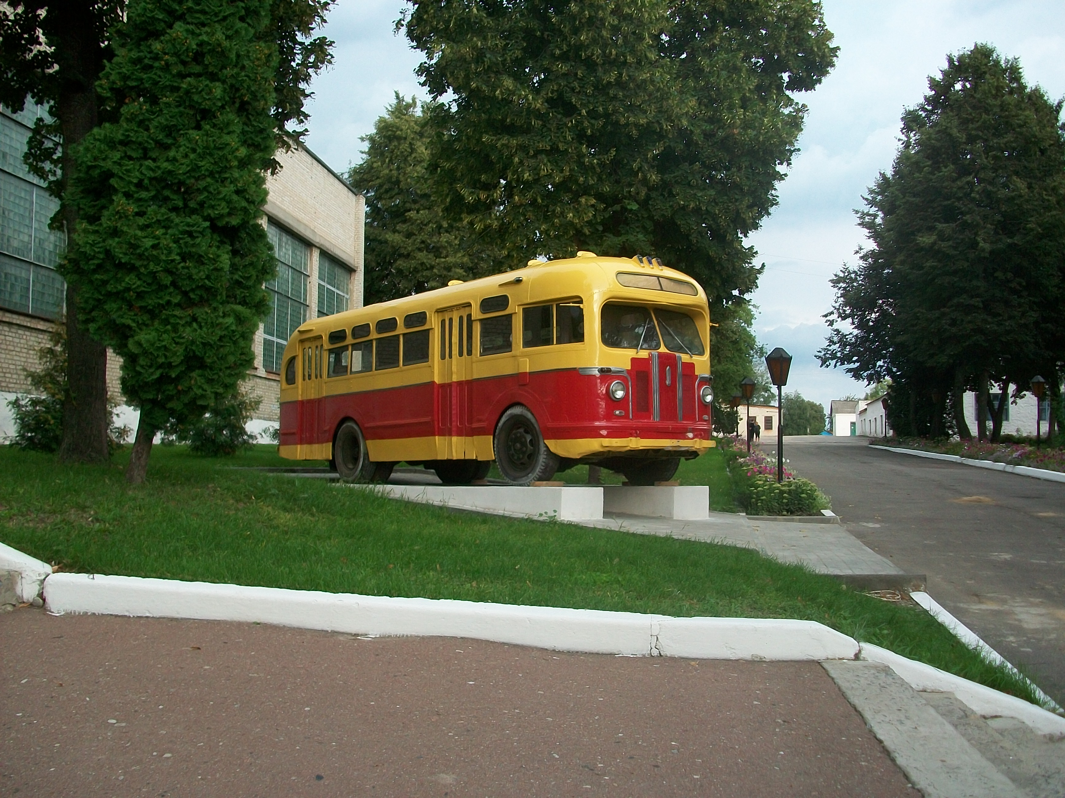 Автобус ЗИС-155 на територии Глуховского коледжа СНАУ.